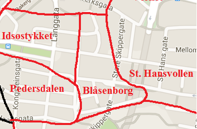 Kart over Blåsenborg i Stavanger i 1844